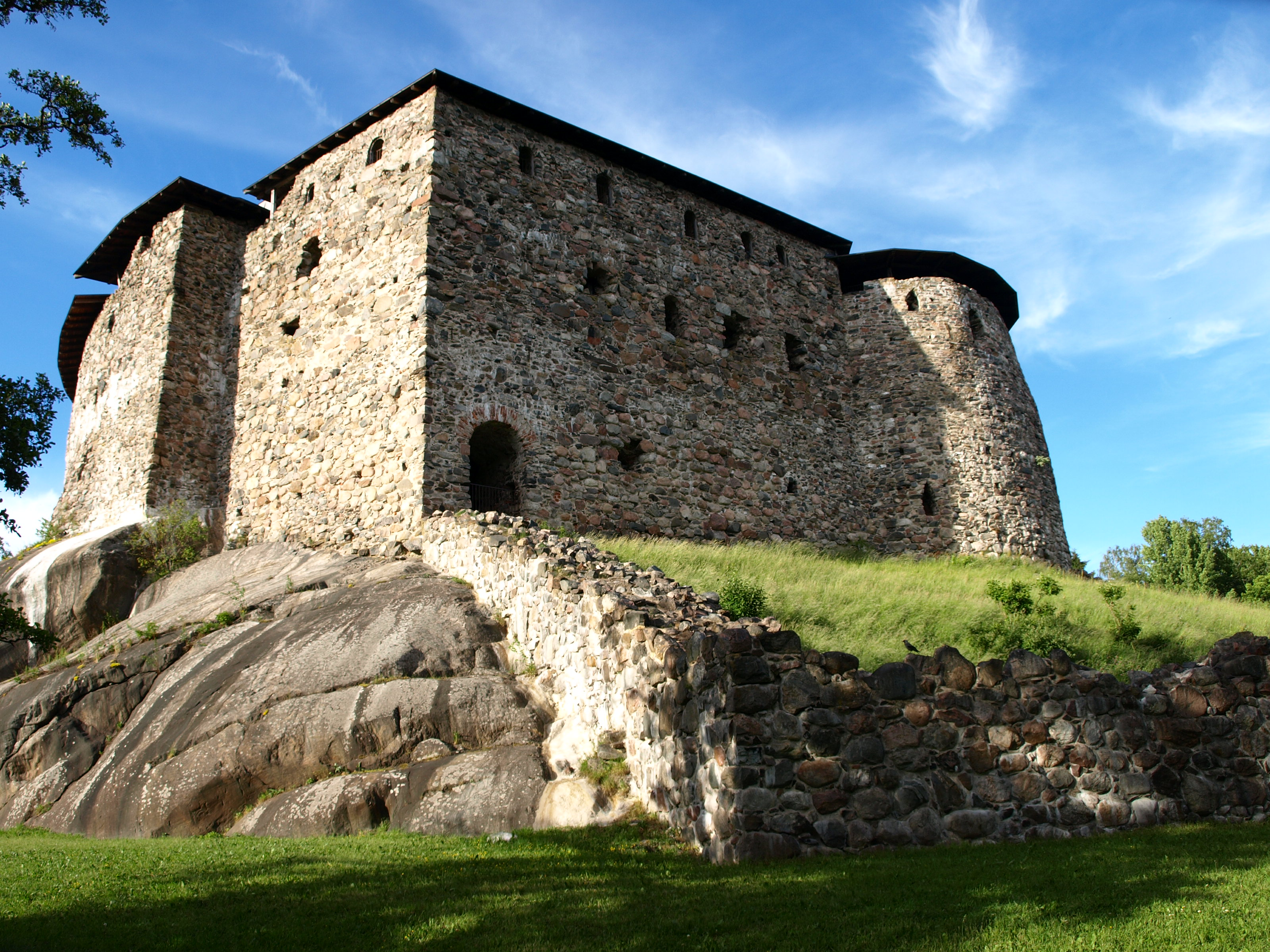 Die Burgruine Raseborg bei Snappertuna (Südfinnland)